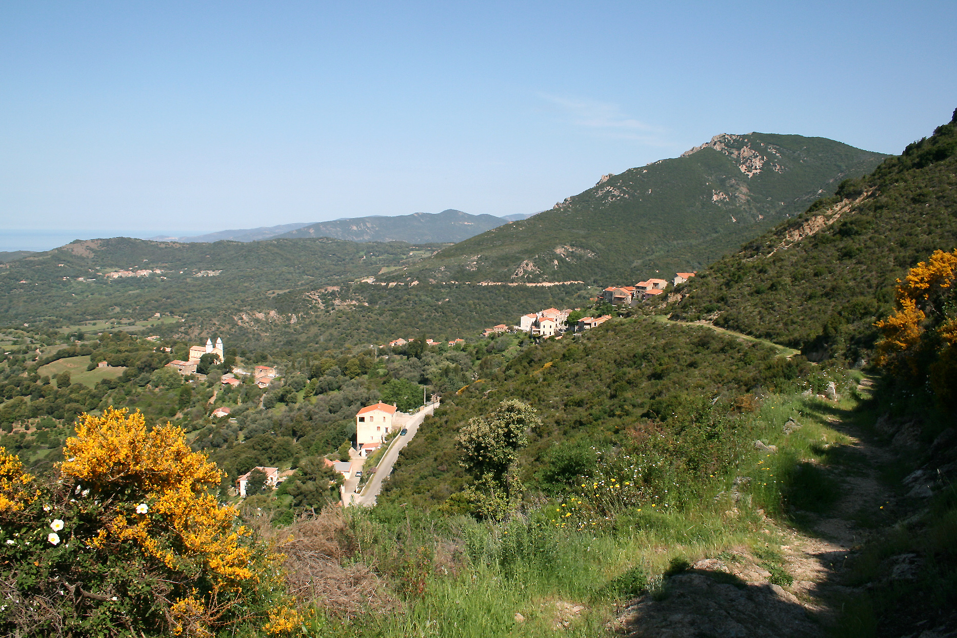 Sari-d'Orcino - France - Corse du Sud, vue du village. Corsu: Sari d'Urcinu Francia (Corsica suttana), vista di paese.